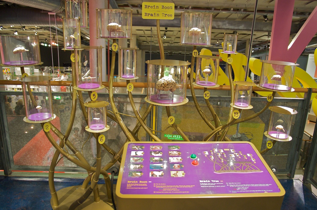 Brein Boom, 2008Venster 1 (Links het wapen van Gerard Wezemaal, de eerste heer van Bergen op Zoom; rechts het wapen van Voorne: Mathilde van Wezemaal, dochter van Arnoud, echtgenote van Albrecht van Voorne. Brein Boom